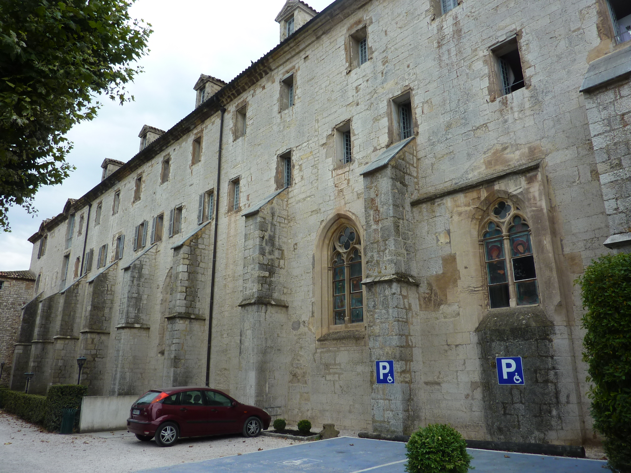 Couvent des Dominicains de Saint-Maximin-la-Sainte-Baume